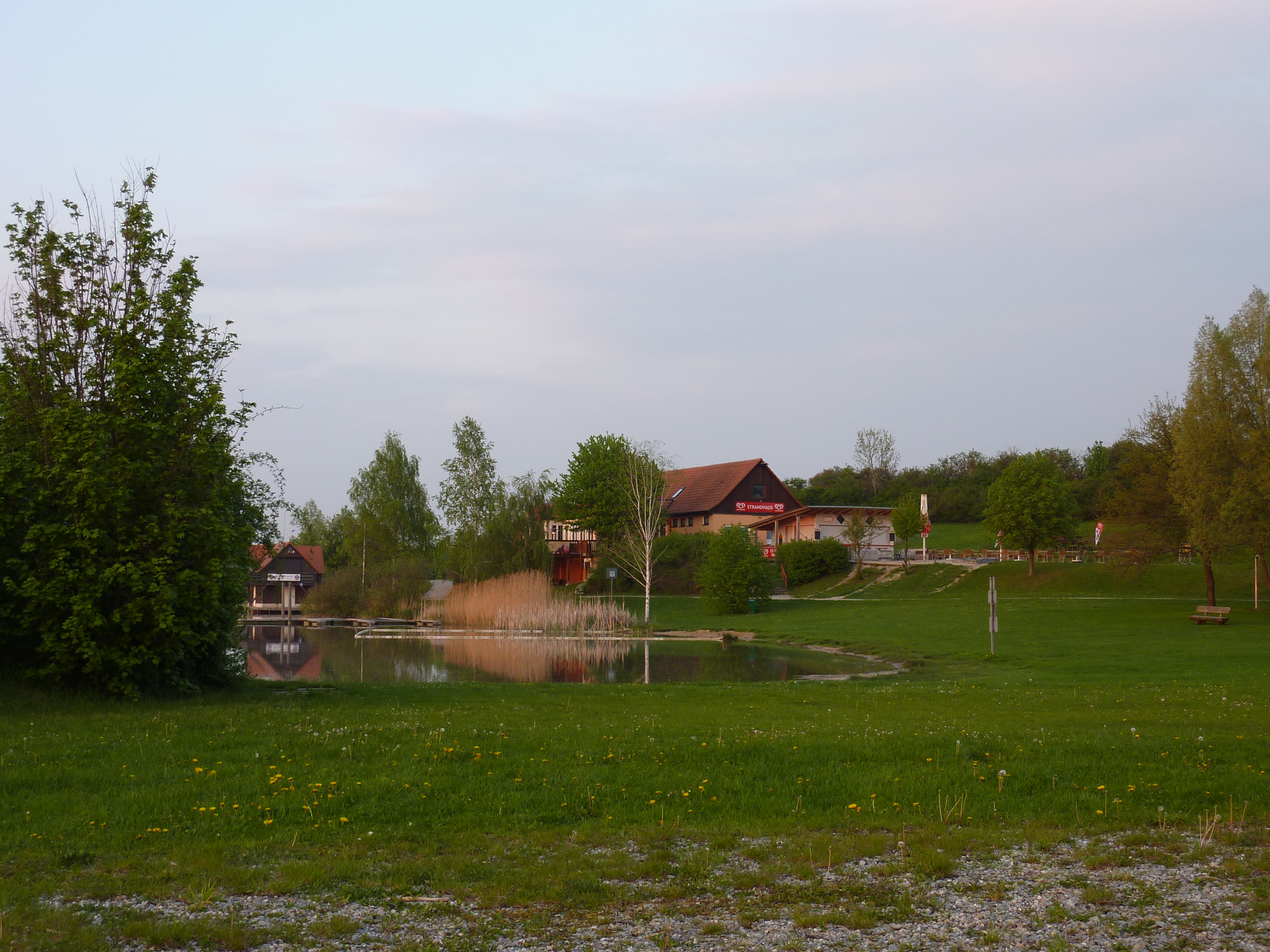 Obernzenner See mit Strandhaus etc.